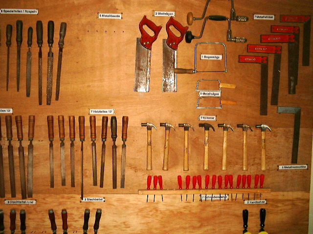 Werken gehört zur Grundausbildung der Schweizerschule Curitiba